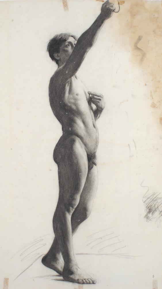 Pedro Weingärtner, estudo, 1878, carvão sobre papel, 60,8 x 40,2 cm. Acervo da Pinacoteca Barão de Santo Ângelo, Instituto de Artes da UFRGS.